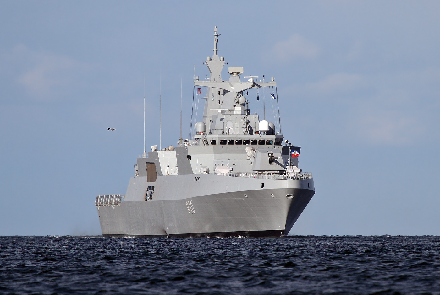 Frégate furtive construite en Allemagne de la classe Meko A-200 (Unité 910), commissionnée par l'Algérie en 2016.